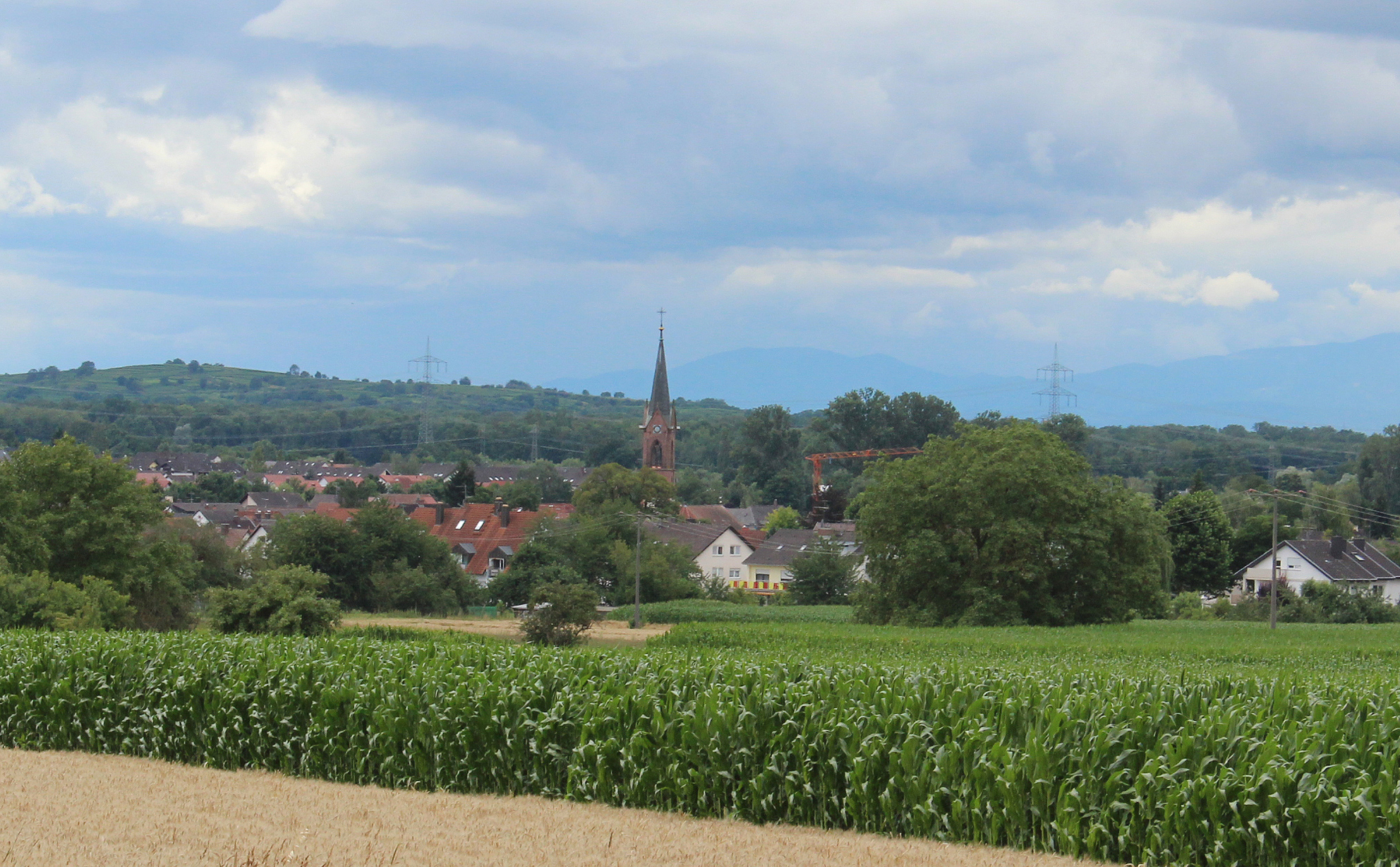 Buchheim, Blick vom Rebstuhl nach Westen